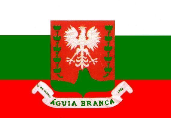 Bandeira de Águia Branca/ES